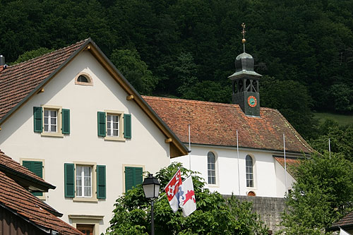 Kirche von Nenzlingen, Kanton Basel-Landschaft